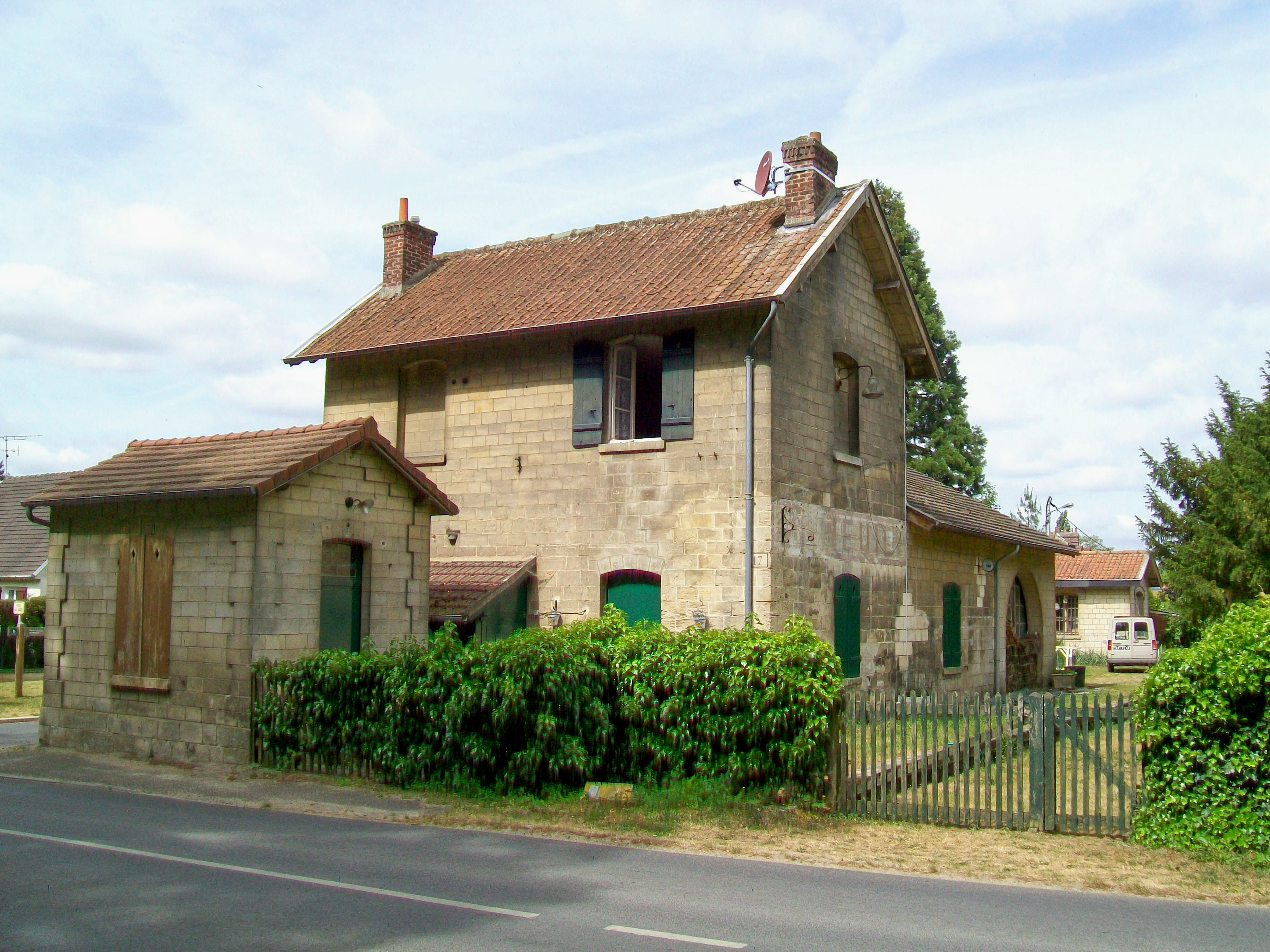 La bâtiment-voyageurs de l'ancien arrêt de Vineuil (commune de Vineuil-Saint-Firmin), avec tous les bâtiments annexes encores intacts ; vue depuis l'ancien passage à niveau (PN). L'emprise de la voie ferrée abandonnée depuis 1960 a été aménagée en chemin de promenade entre ce PN et le PN de Saint-Firmin.